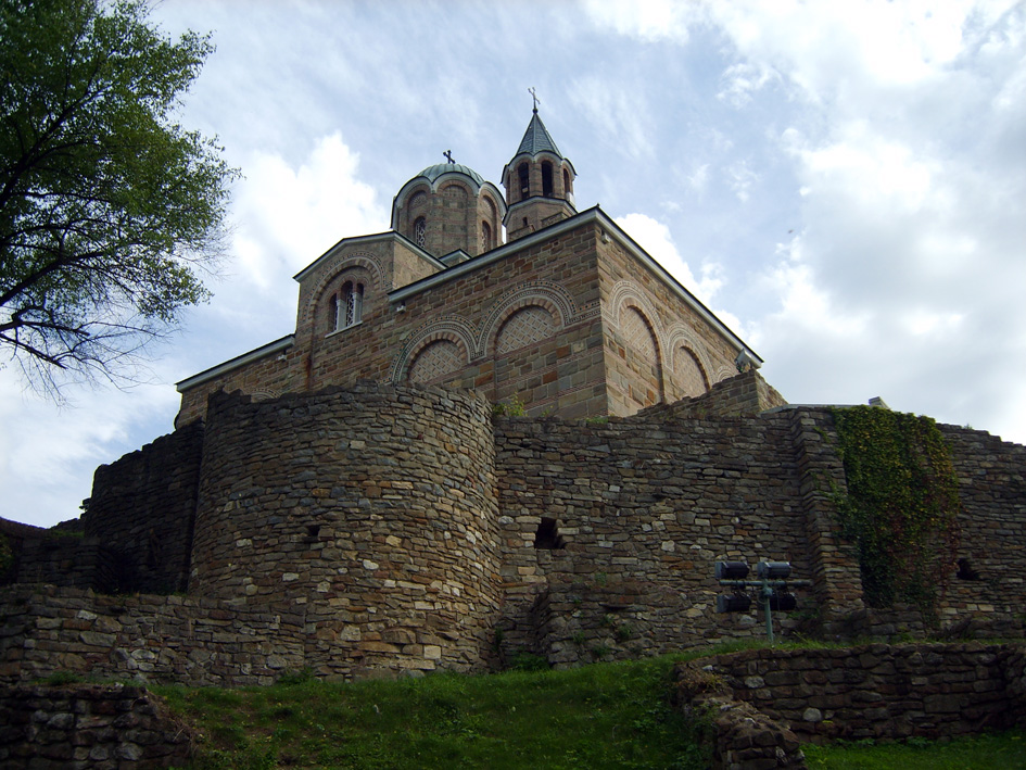 Патриаршията, Царевец, Търново